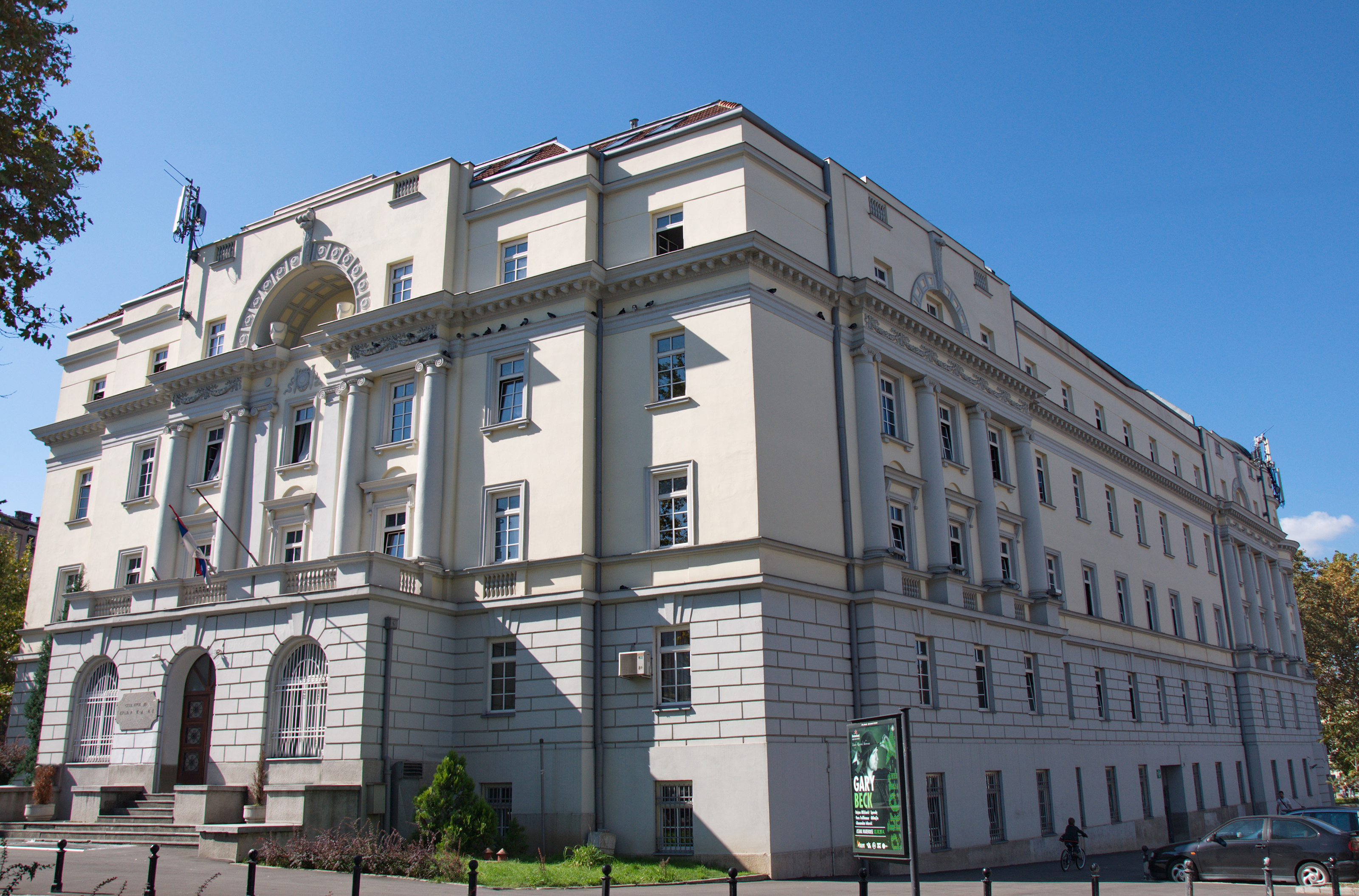 Srpski (latinica): Studentski dom kralj Aleksandar I u Beogradu se nalazi u Bulevaru kralja Aleksandra 75. Studentski dom kralj Aleksandar I je sagrađen 1927-1928. godine, prema projektu ruskog arhitekte Georgija Pavloviča Kovaljevskog, za studente Beogradskog univerziteta. Glavna fasada istaknuta ulaznom stepenišnom partijom i balkonom prvog sprata okrenuta je ka raskrsnici Ulice kraljice Marije i Bulevara kralja Aleksandra. Koncipiran je kao slobodnostojeći objekat razuđene osnove trapezoidnog oblika koji u silueti ostvaruje masivnu kubusnu formu.